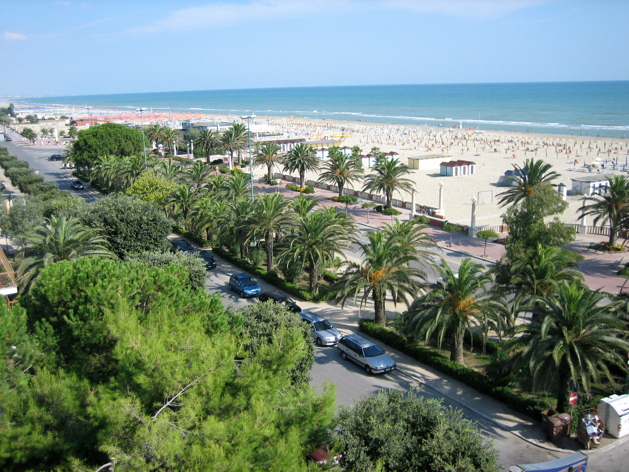 Scorcio lungomare di Giulianova